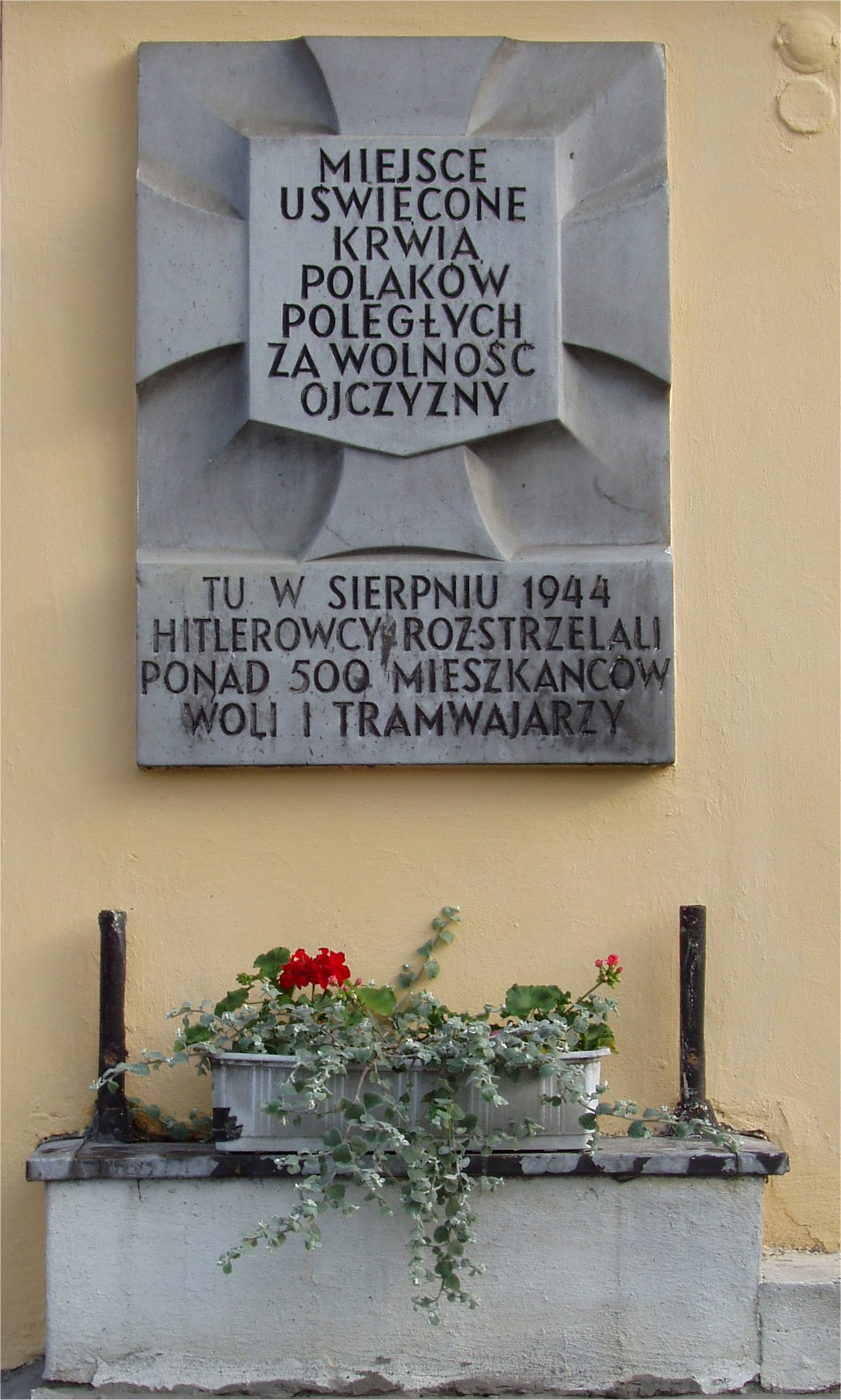 Przy ul. Siedmiogrodzkiej w Warszawie (fot Zu)